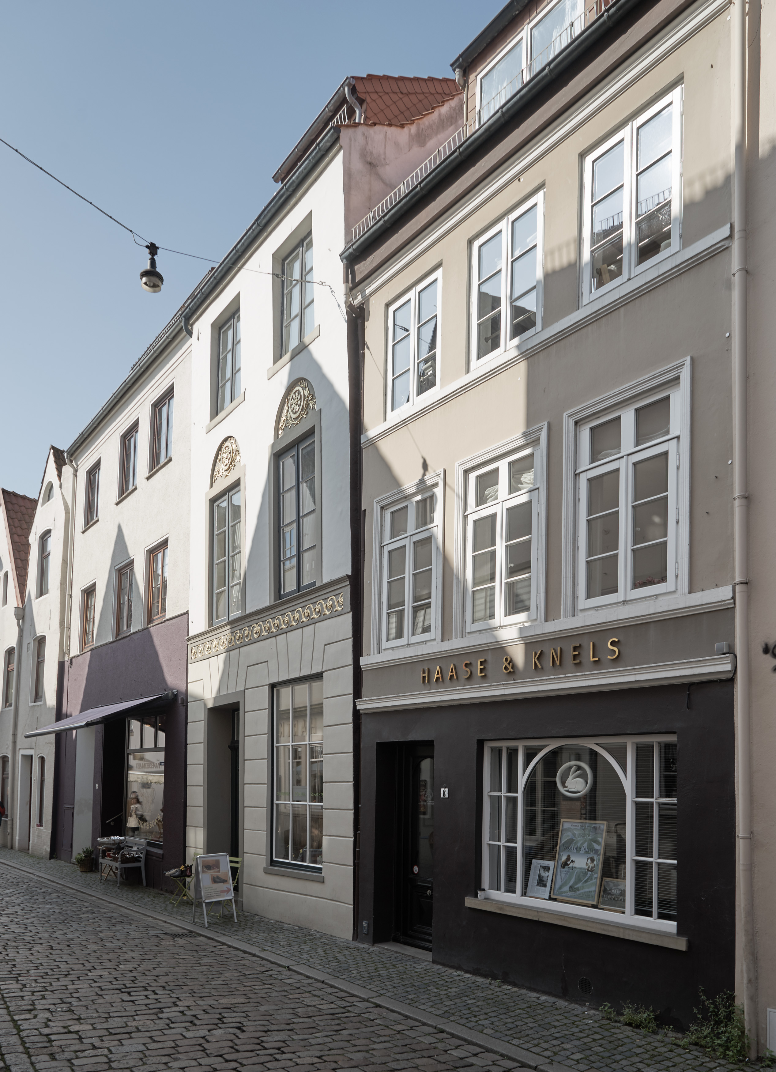 Werbeagentur Haase und Knels in Bremen, Am Landherrnamt 8Das abgebildete Objekt ist ein geschütztes Kulturdenkmal in der Freien Hansestadt Bremen, mit der Nr. 1381 beim Landesamt für Denkmalpflege registriert.